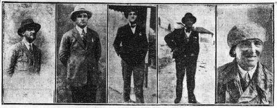 foto vecchi giornali